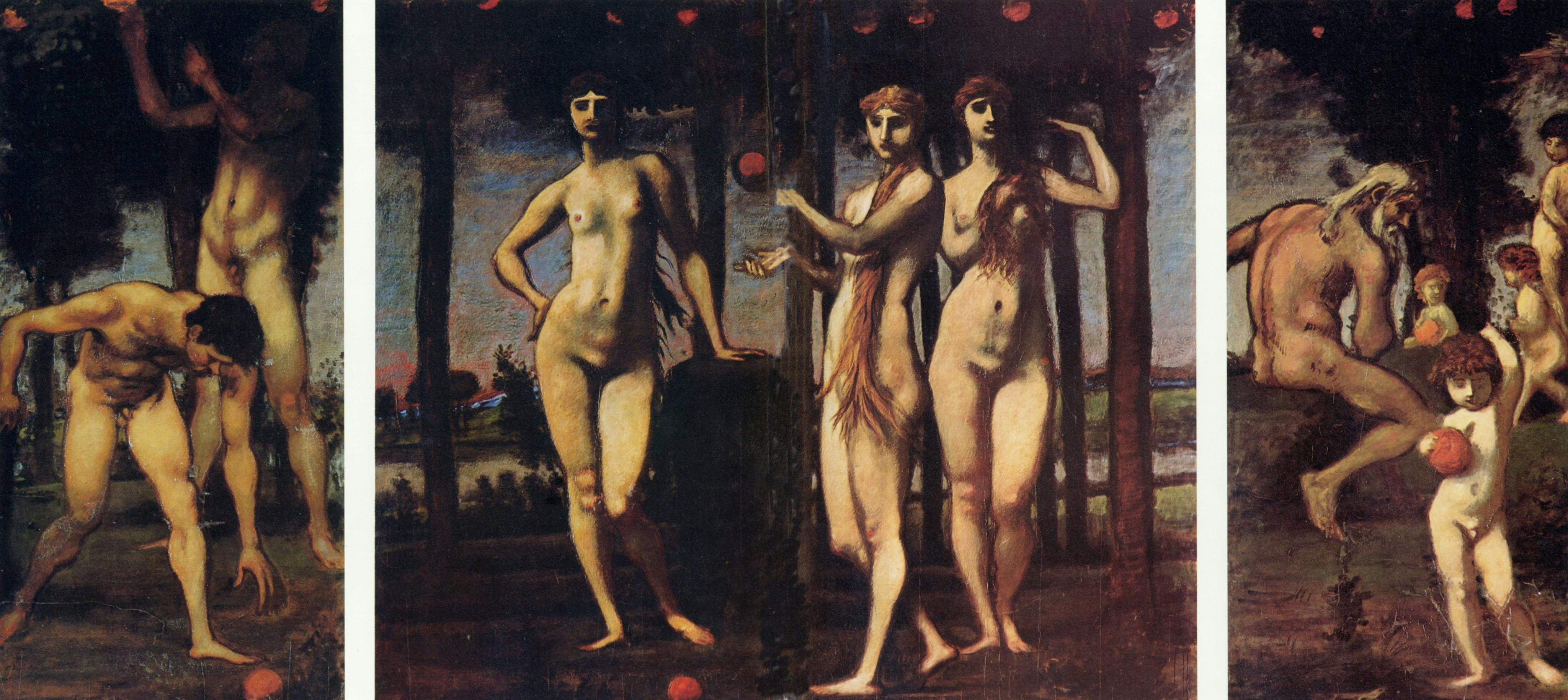 Darstellung aus der griechischen Mythologie. Die Hesperiden hüten im Garten einen Wunderbaum, der 'Ewige Jugend' verspricht.